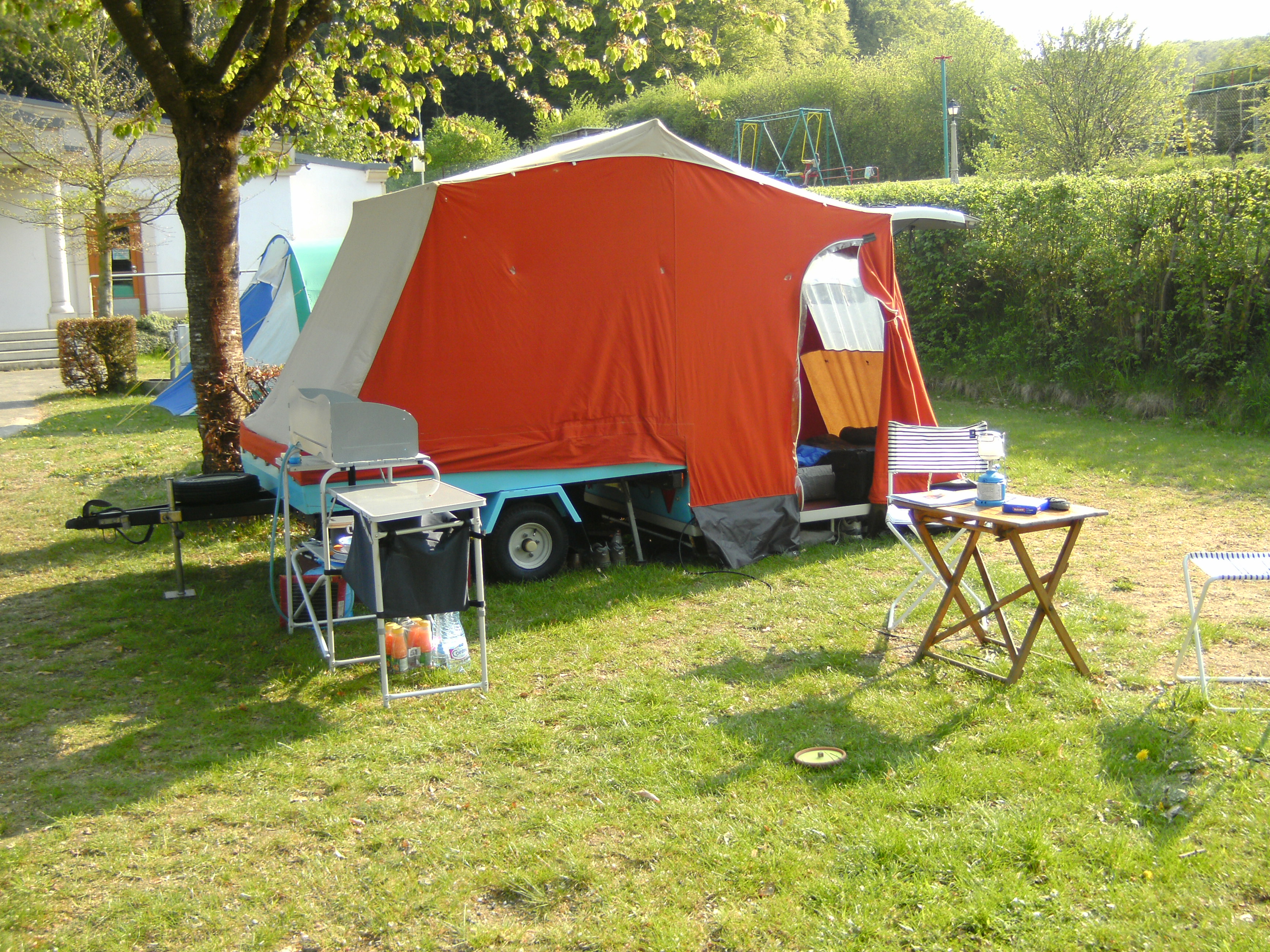 Weil der Last-Zelt-Anhänger keine eigene Küche besitzt, empfiehlt sich die Mitnahme einer separaten Klappküche.